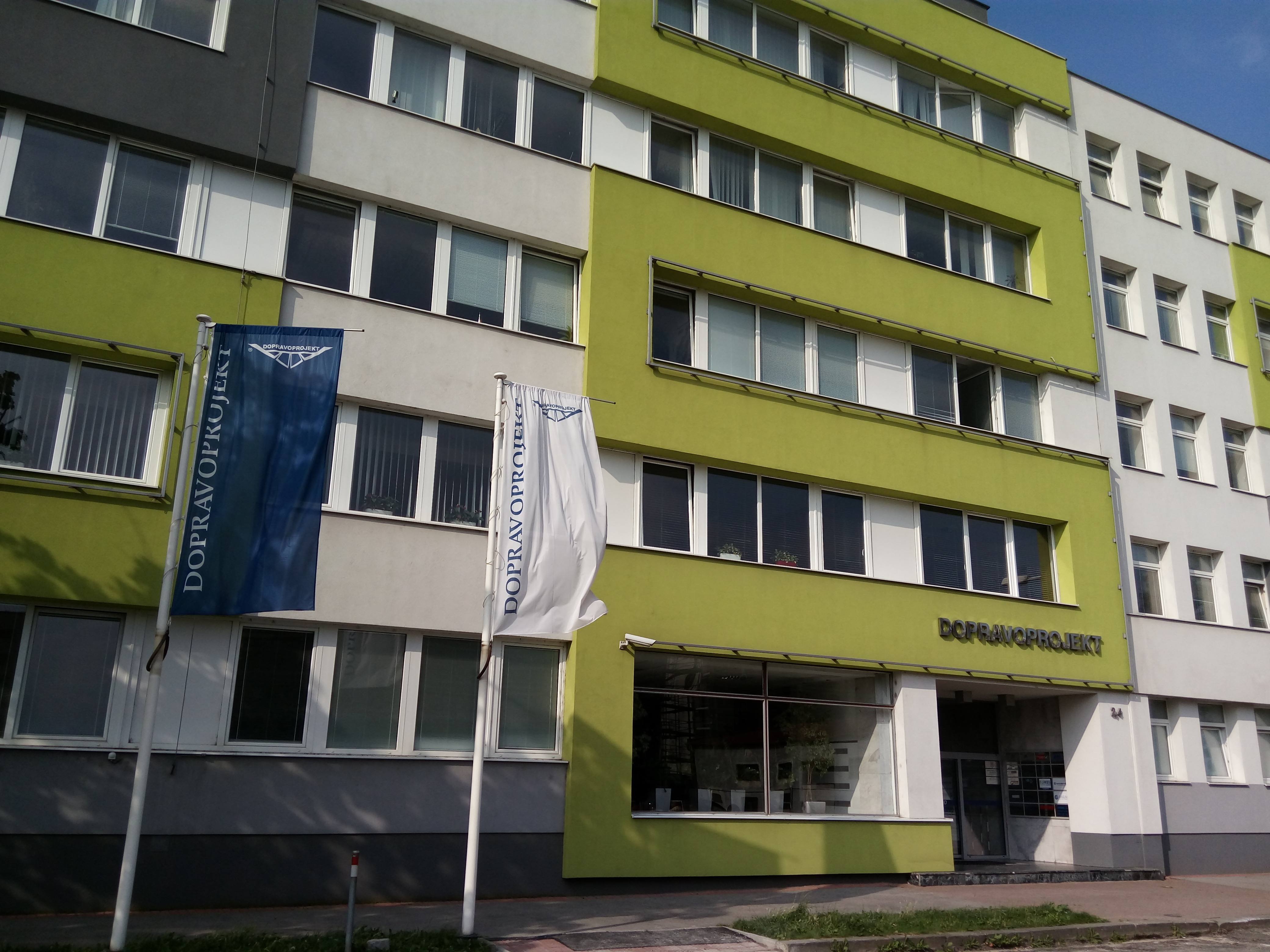 Dopravoprojekt, Kominárska 2, 4, Nové Mesto, Bratislava